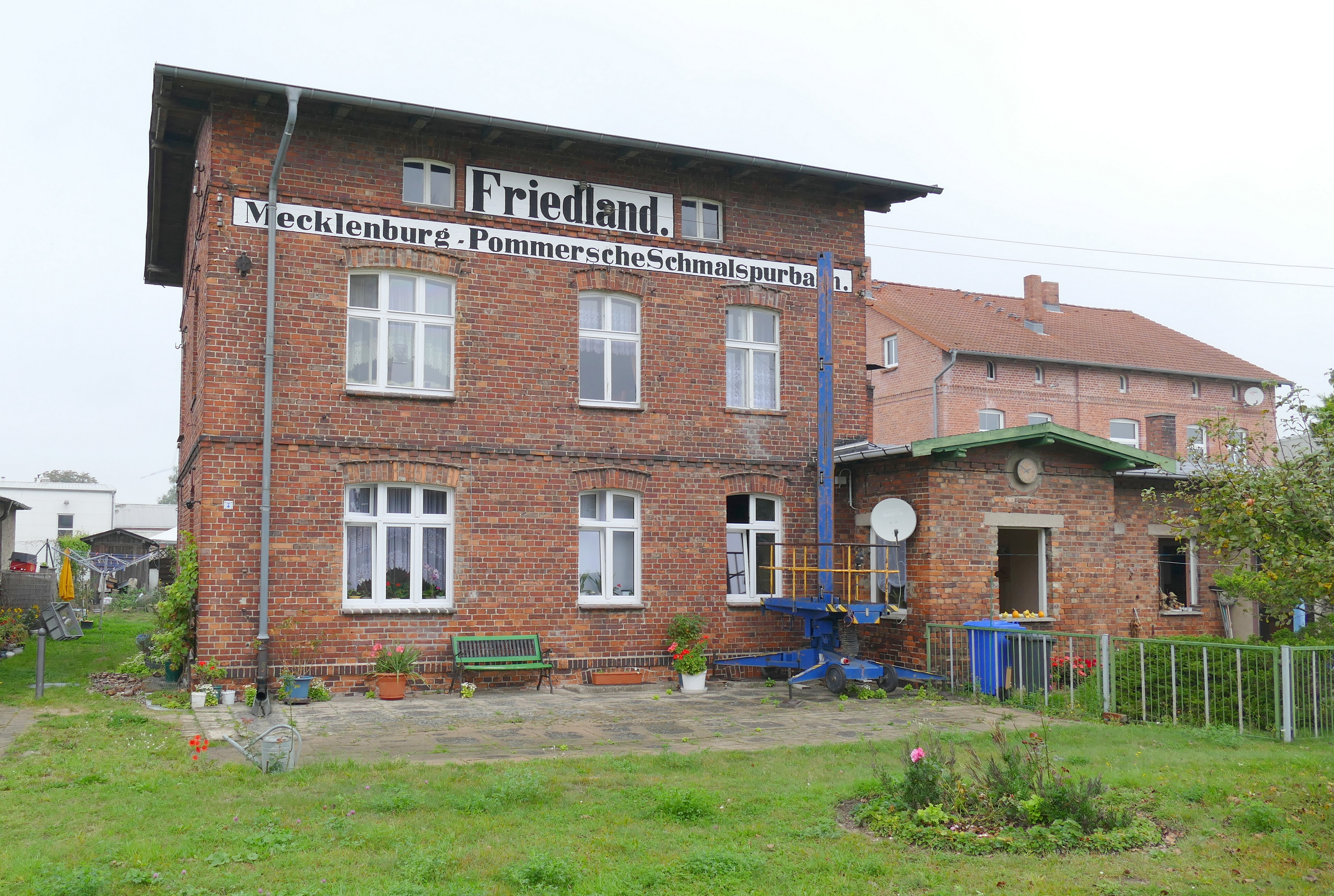 Friedland (Mecklenburg), ehemaliger Bahnhof der Mecklenburg-Pommerschen Schmalspurbahn (MPSB), Empfangsgebäude